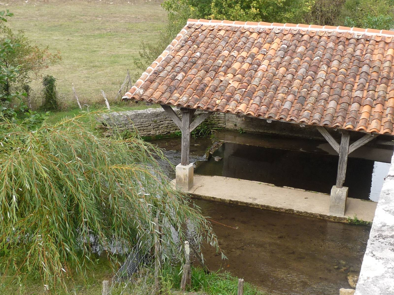 la Lizonne au pied du bourg de Bioussac, Charente, France